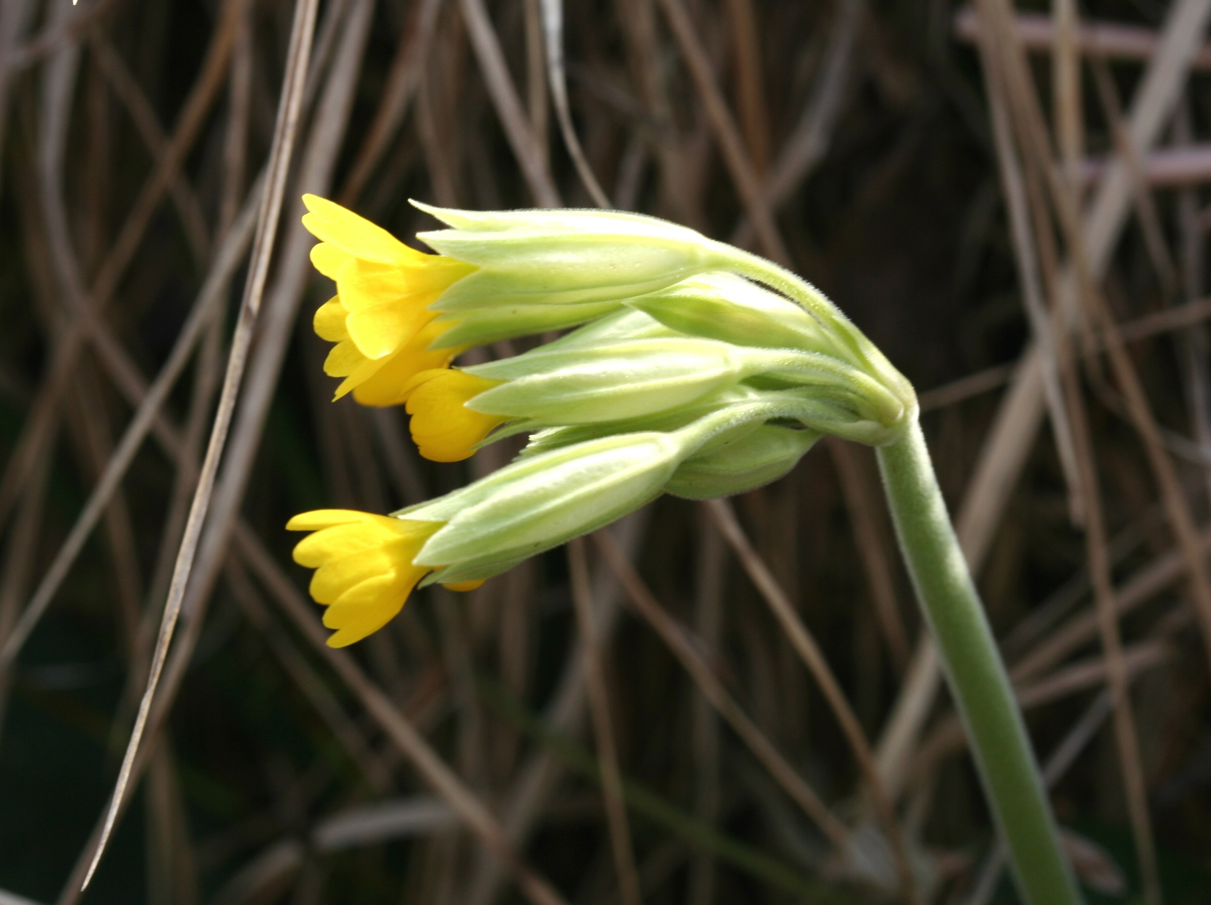 Primula_veris (Primula odorosa) Località : Pellegai, Mel (BL), 503 m s.l.m.